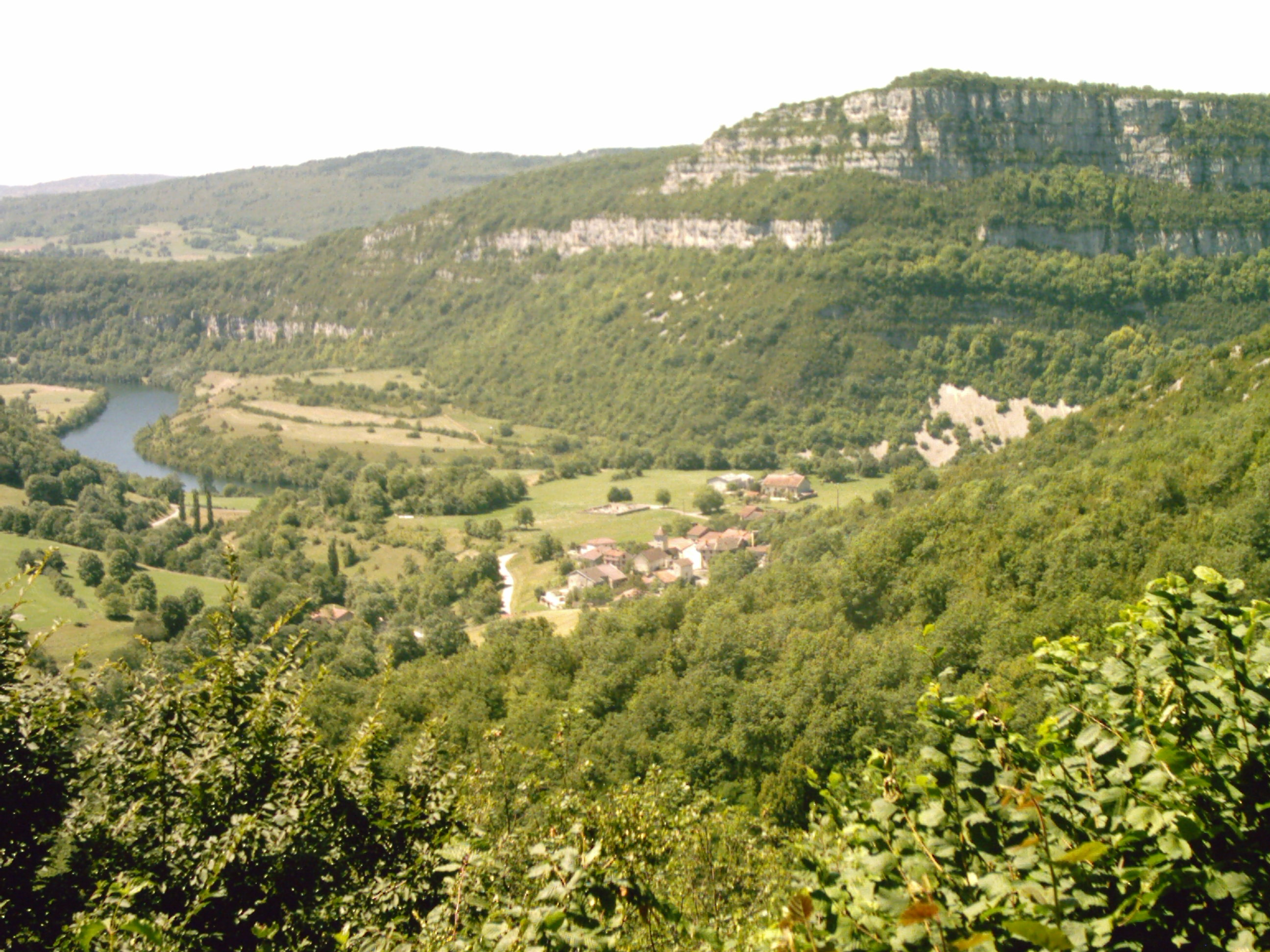 Vue générale de la commune de Bolozon (dites gare)